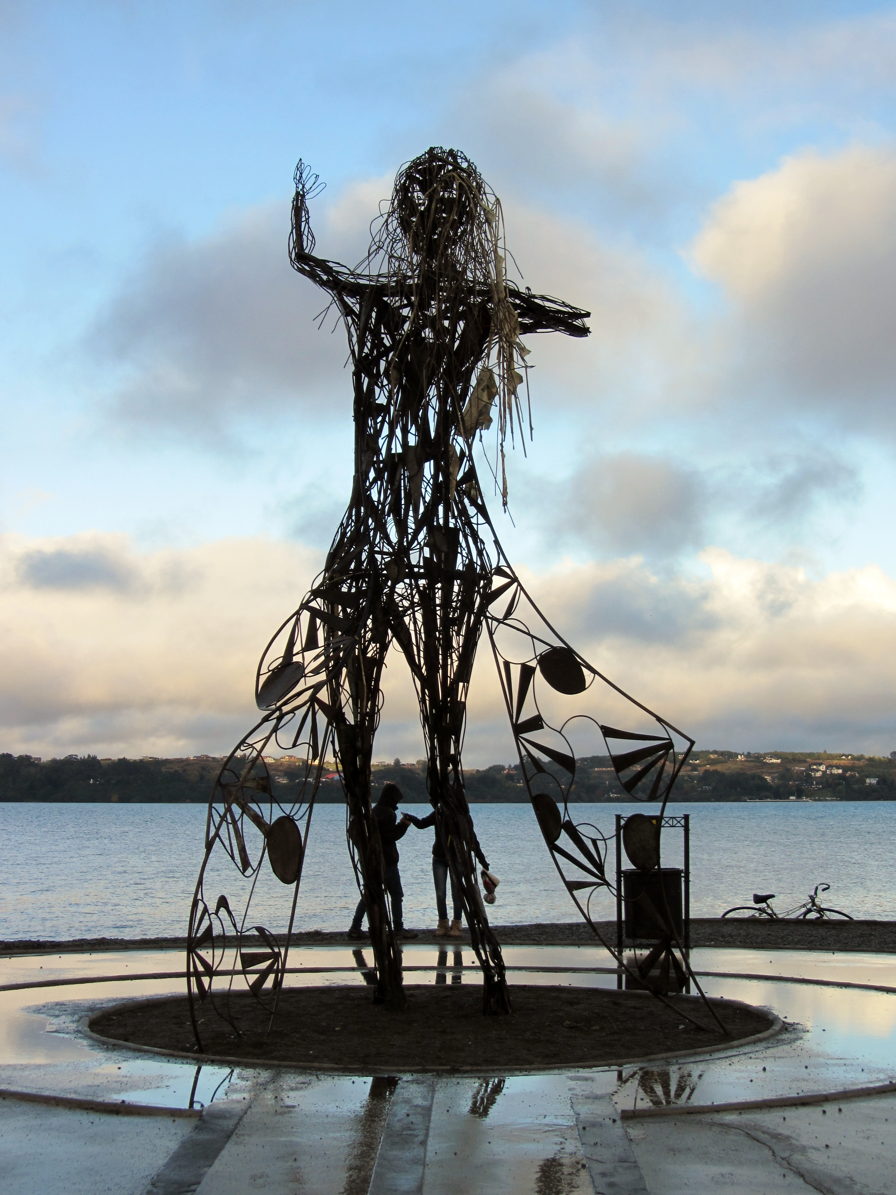 Princesa Licarayén, escultura ubicada en La Puntilla, Puerto Varas, Chile. La leyenda de Licarayén es una leyenda mapuche sobre el volcán Osorno y el lago Llanquihue.